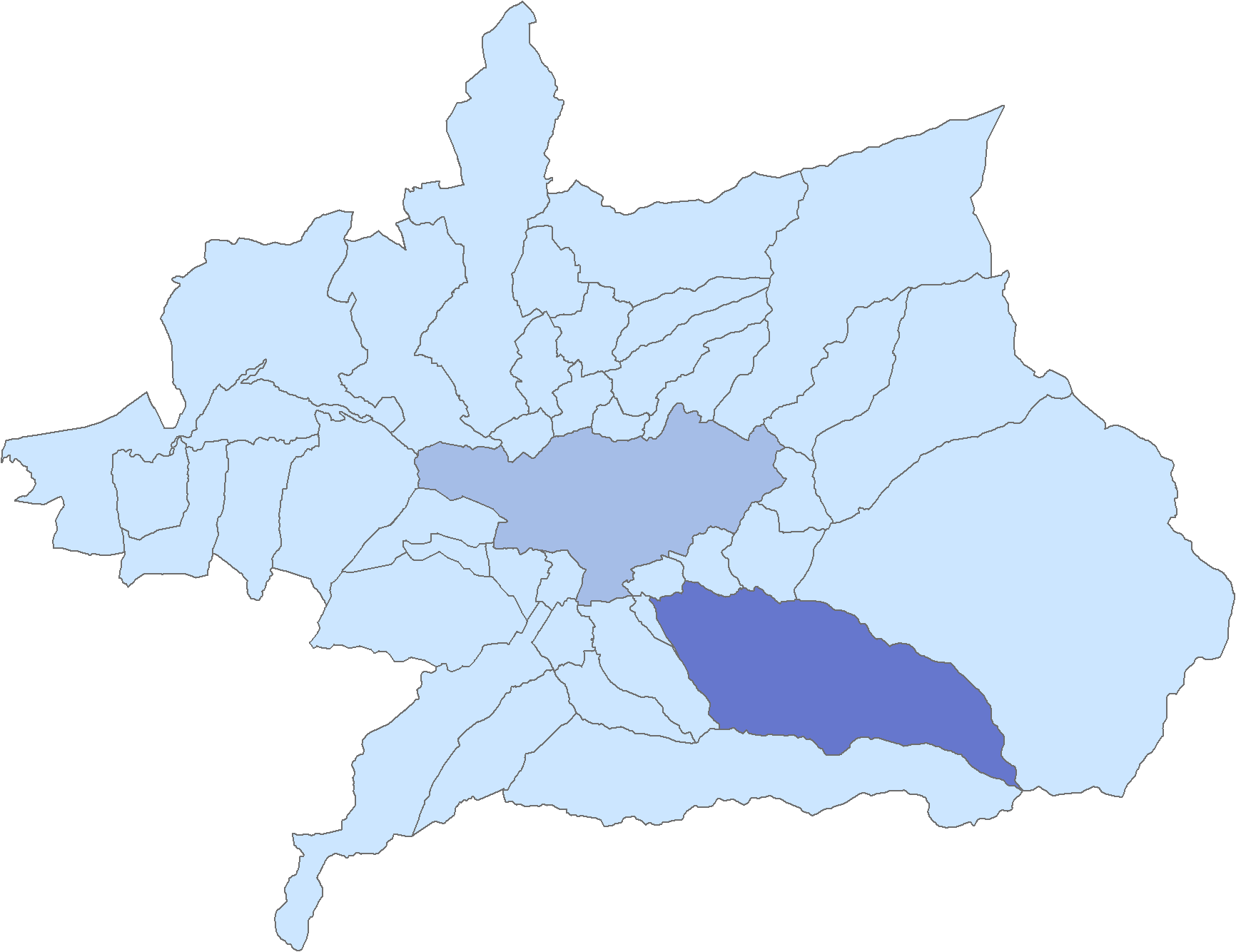 Situación del municipio de Monachil respecto a la comarca de la Vega de Granada, en España.